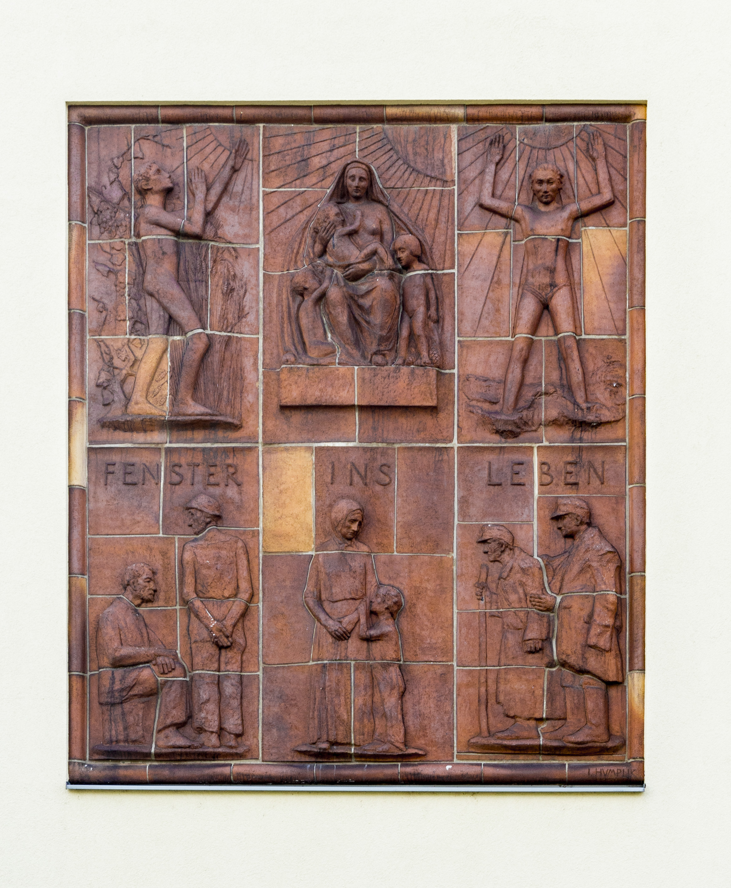 Steinzeugrelief Fenster ins Leben, Schwenkgasse 54-60, Josef Humplik This media shows the Vienna residential building (Gemeindebau) with the ID 891.